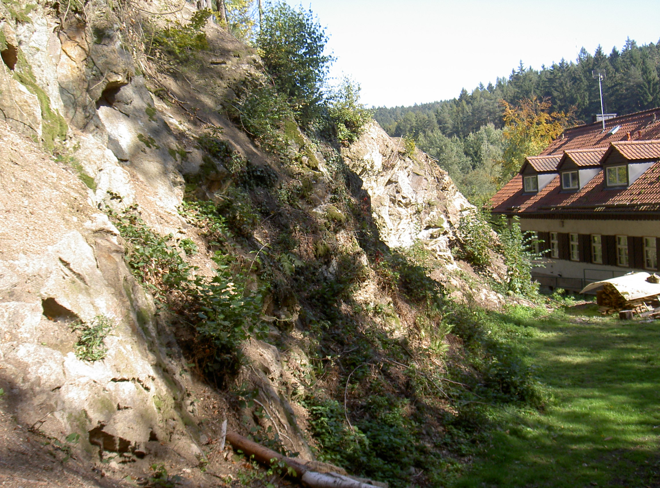 Ehemaliger Steinbruch an der Blockhütte östlich von Weiden